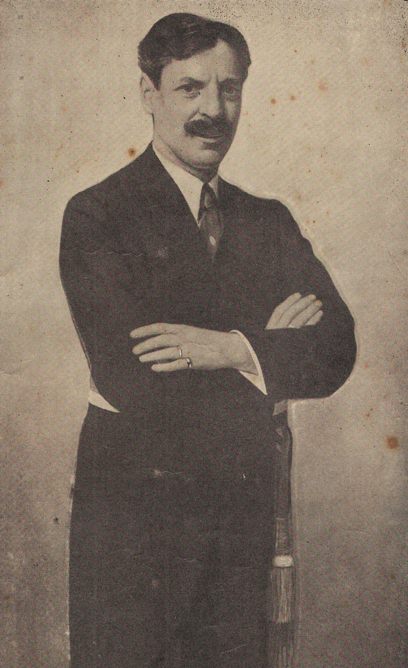 Eugène Callewaert, burgemeester van Lichtervelde